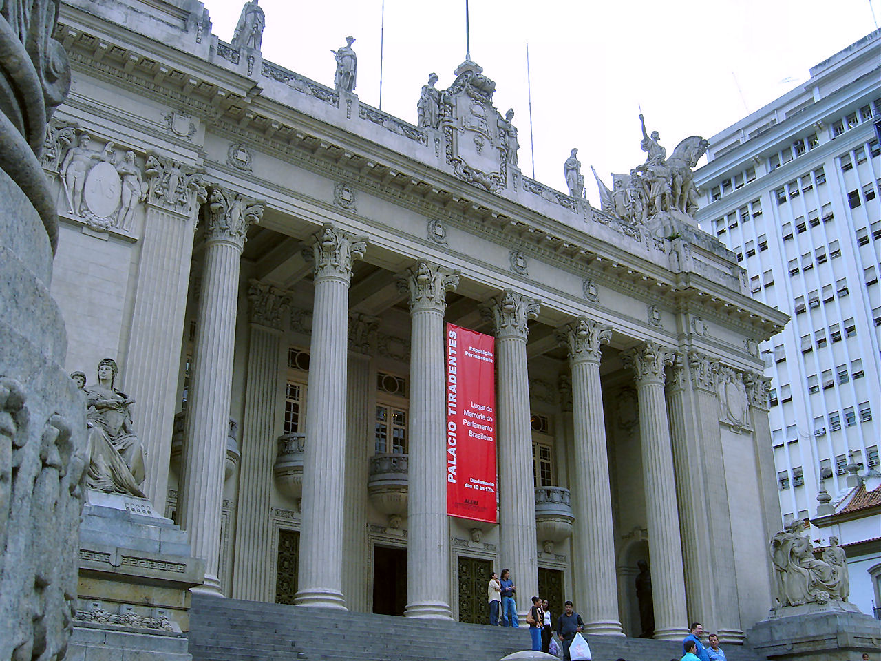 Palácio Tiradentes no Rio de Janeiro, Brasil.